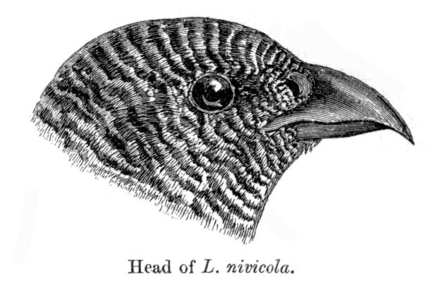 Lerwa lerwa (head)